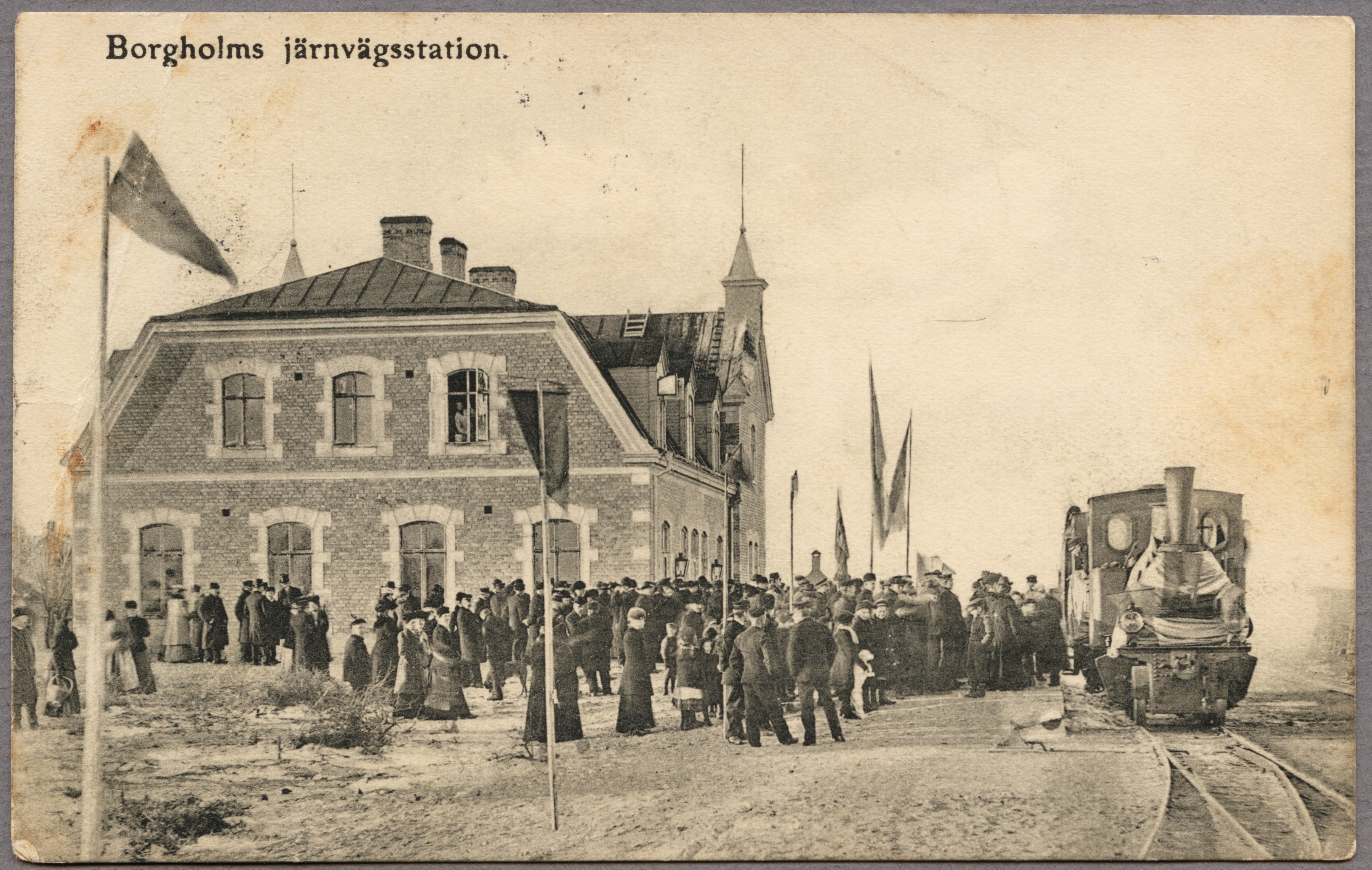 Text på framsida: "Borgholms Järnvägsstation". Text på baksida: "[skriftligt meddelande]". "ÖJ". Historik: Vykortet poststämplat 1907. Borgholm station invigd 1906-12-01.